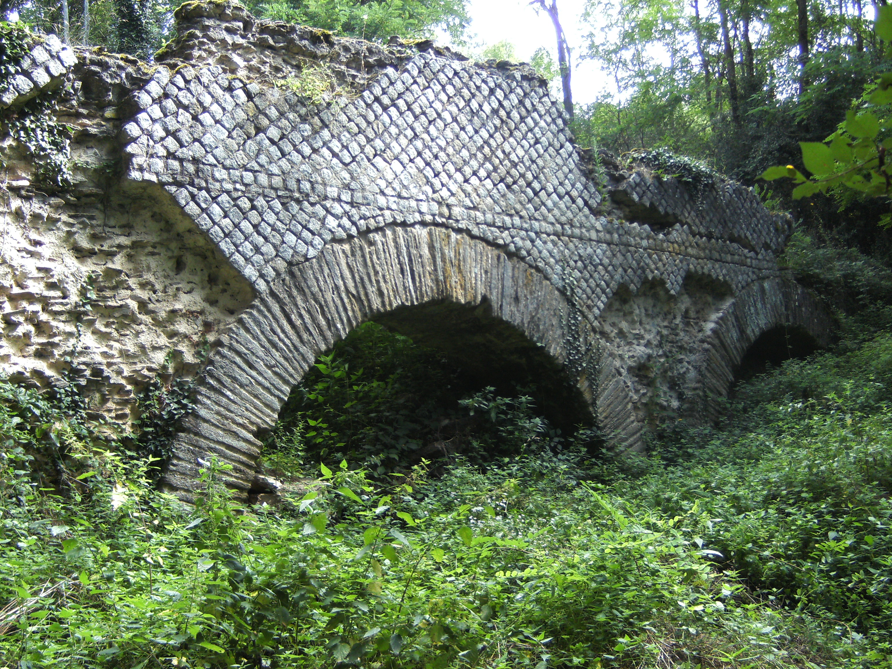 Aqueduc du Gier. Le pont de Jurieux à Saint-Maurice-sur-Dargoire